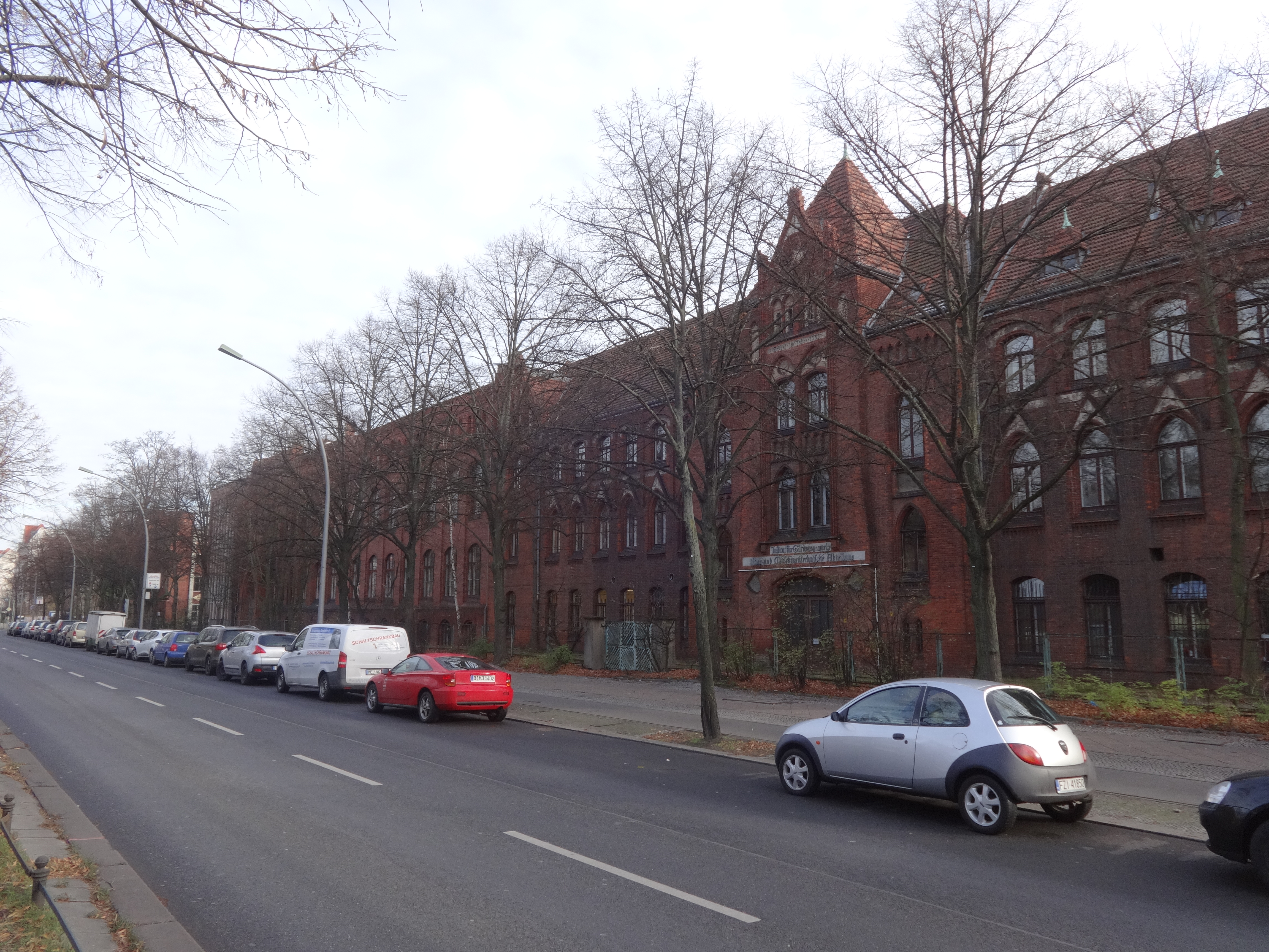 Berlin-Wedding im Winter